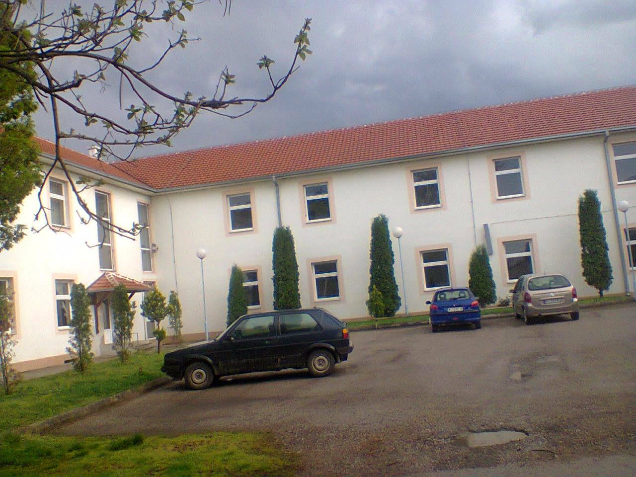 Основна школа Вук Караџић у Пуковцу